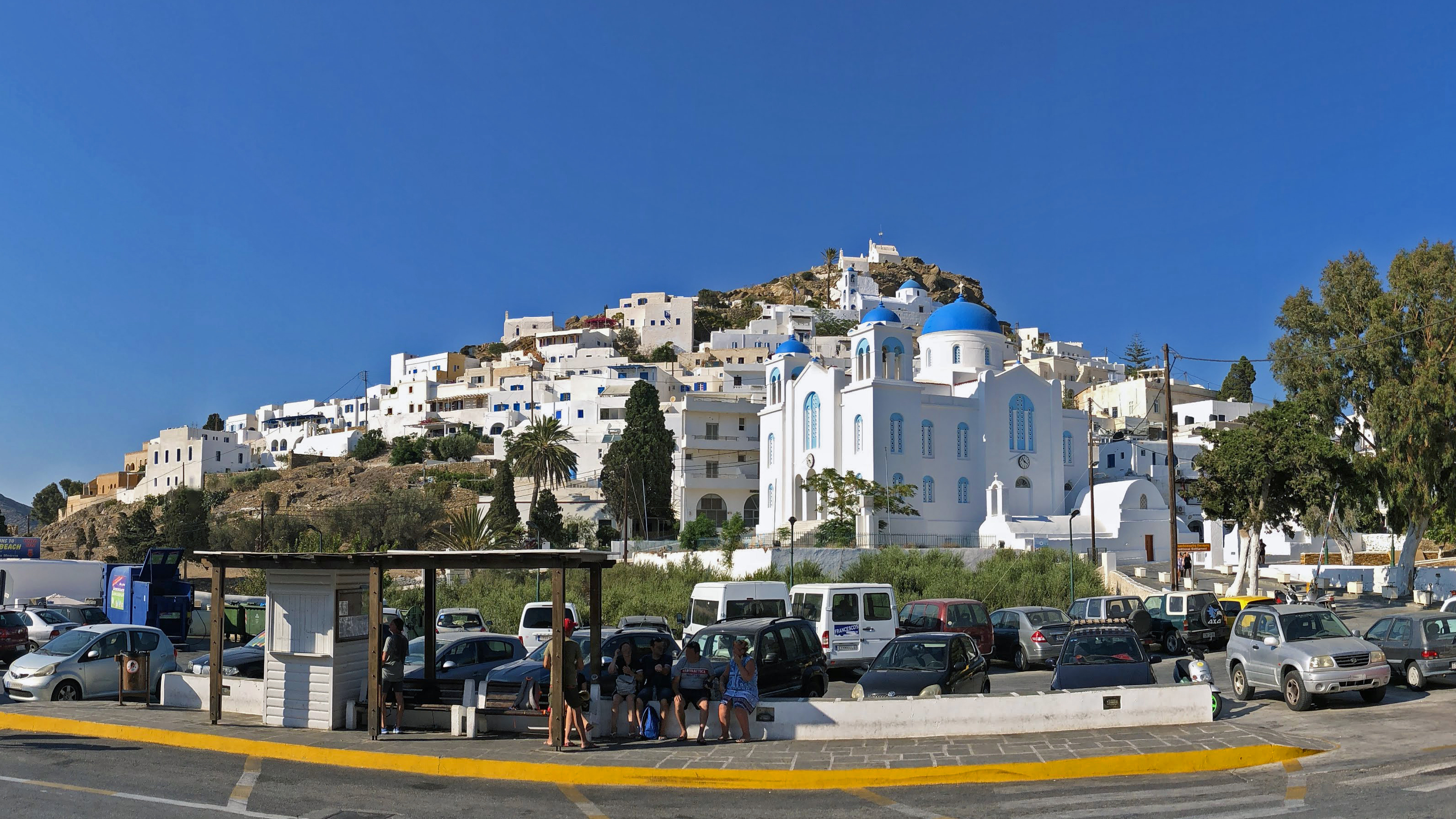 Chora, capoluogo dell'isola di Ios in Grecia, agosto 2018